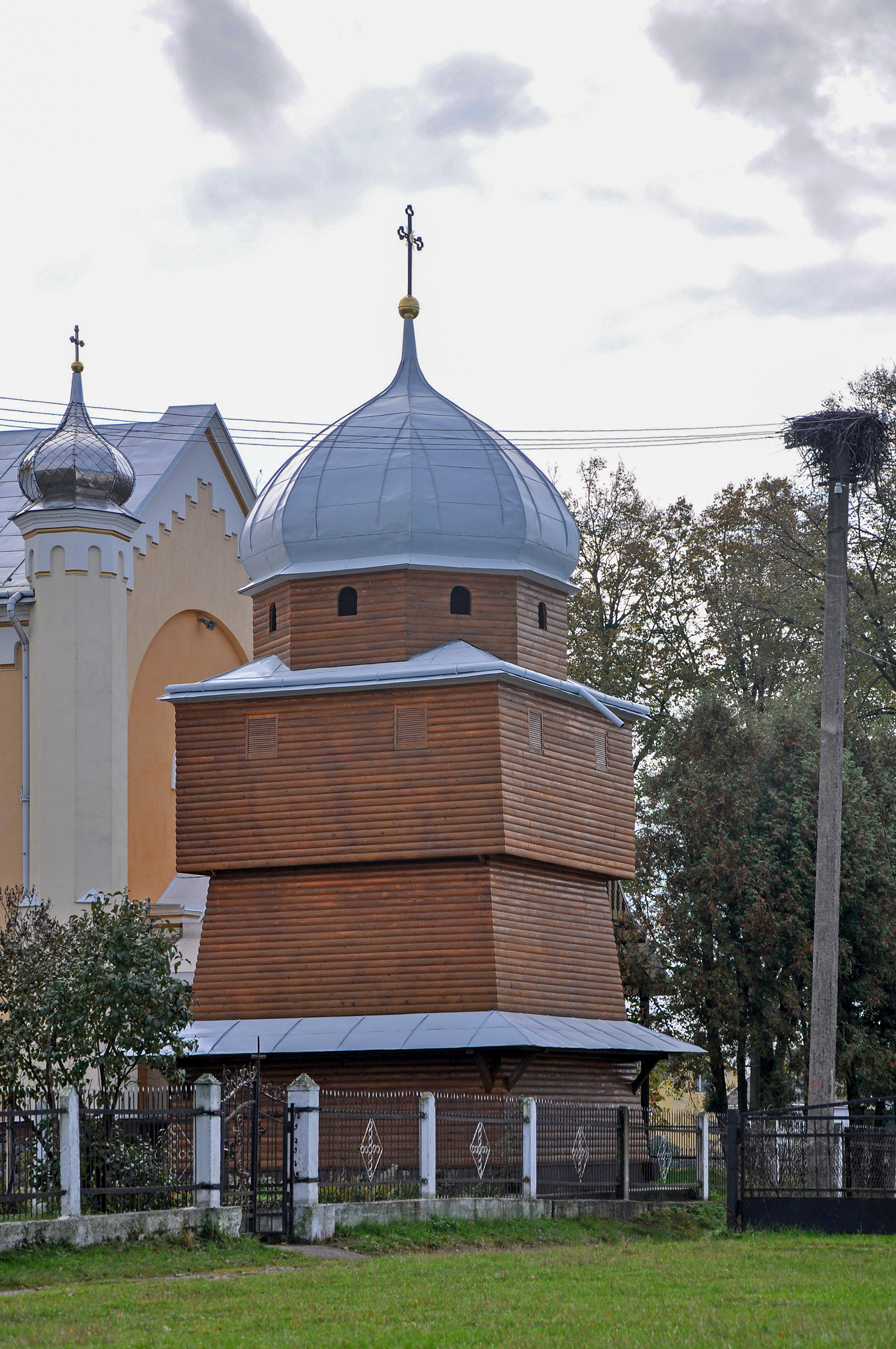 Дзвіниця (дер.), с.Ставчани